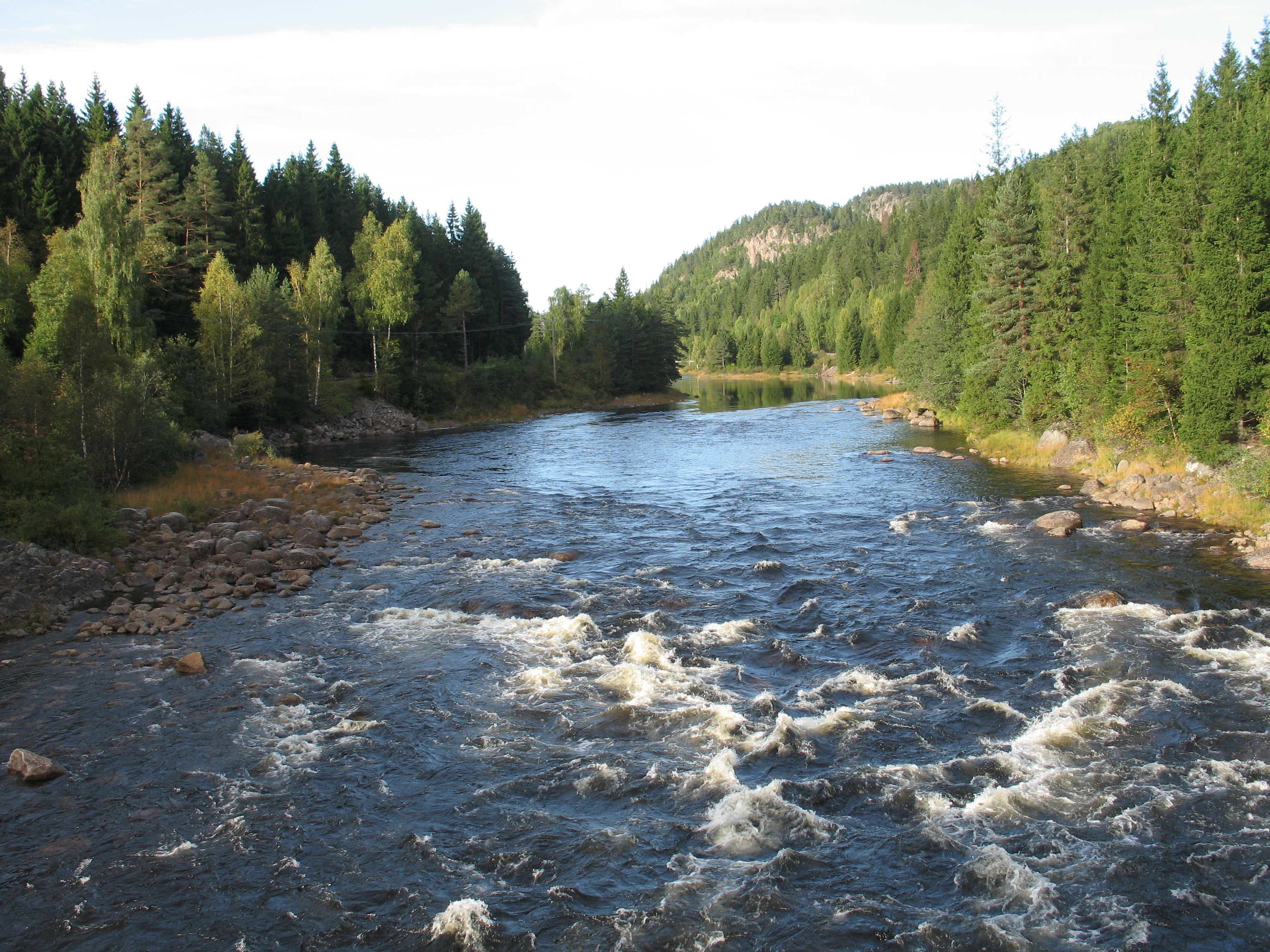 Tovdalselva ved Slettene bru i Birkenes